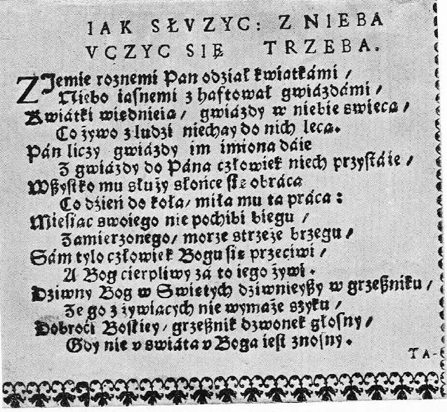 Karta z książki Lutnia Apollina autorstwa biskupa Lazara Baranowicza.